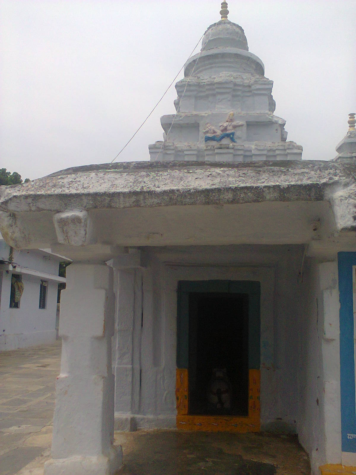 సంగమేశ్వర స్వామి ఆలయం